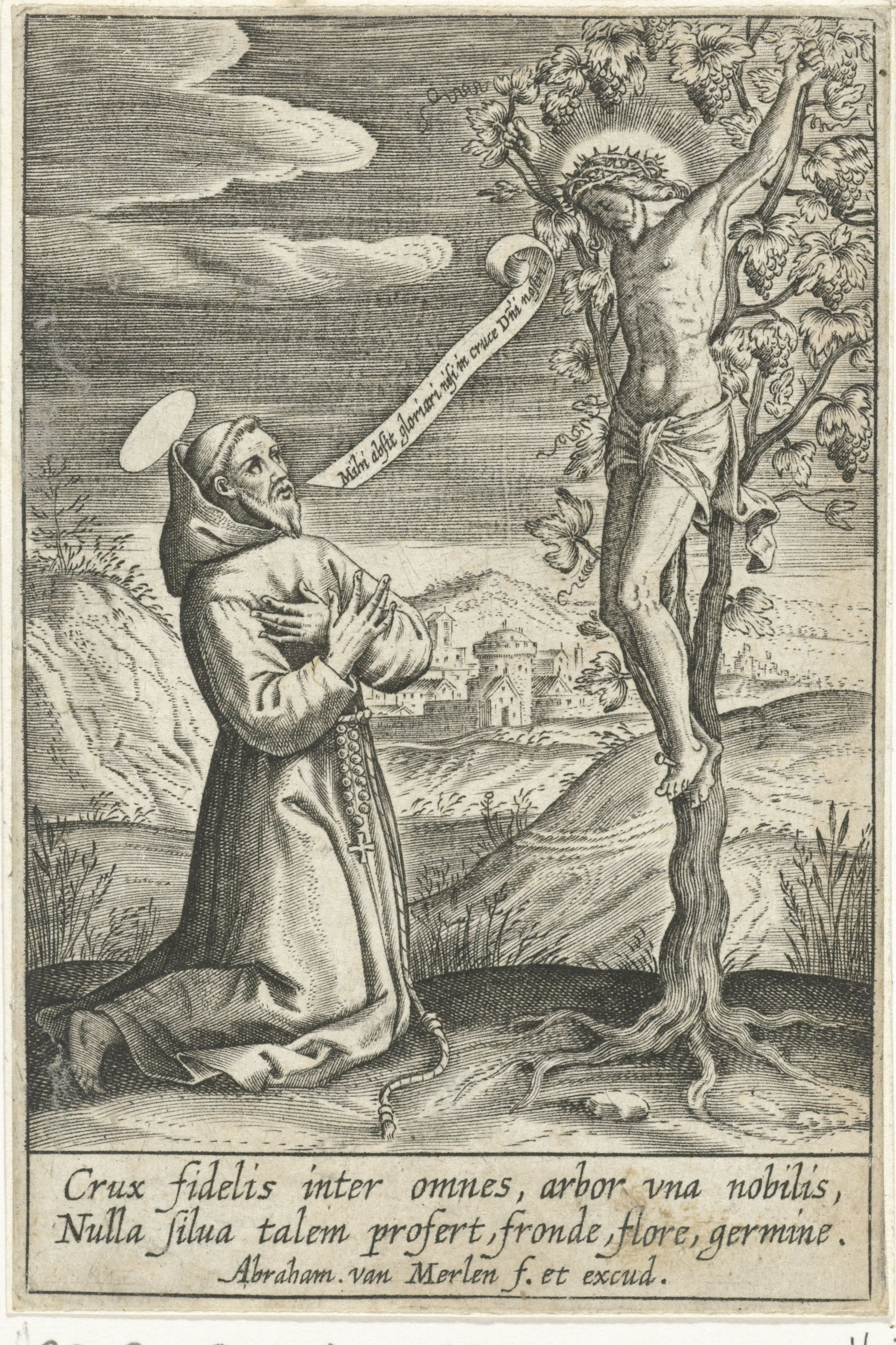 IdentificatieTitel(s): Knielende heilige voor Christus aan het kruisObjecttype: prent Objectnummer: RP-P-1878-A-1287Catalogusreferentie: Hollstein Dutch 22Opschriften / Merken: verzamelaarsmerk, verso, gestempeld: Lugt 2228Omschrijving: Een heilige, gekleed in monnikspij, geknield voor een aan een wijnstok gekruisigde Christus.VervaardigingVervaardiger: prentmaker: Abraham van Merlen (vermeld op object)uitgever: Abraham van Merlen (vermeld op object)Plaats vervaardiging: AntwerpenDatering: 1600 - 1660Fysieke kenmerken: gravureMateriaal: papier Techniek: graveren (drukprocedé)Afmetingen: blad: h 83 mm × b 57 mmOnderwerpWat: Christ crucified on a tree or on a vinekneeling figureVerwerving en rechtenVerwerving: aankoop 7-jan-1878Copyright: Publiek domein